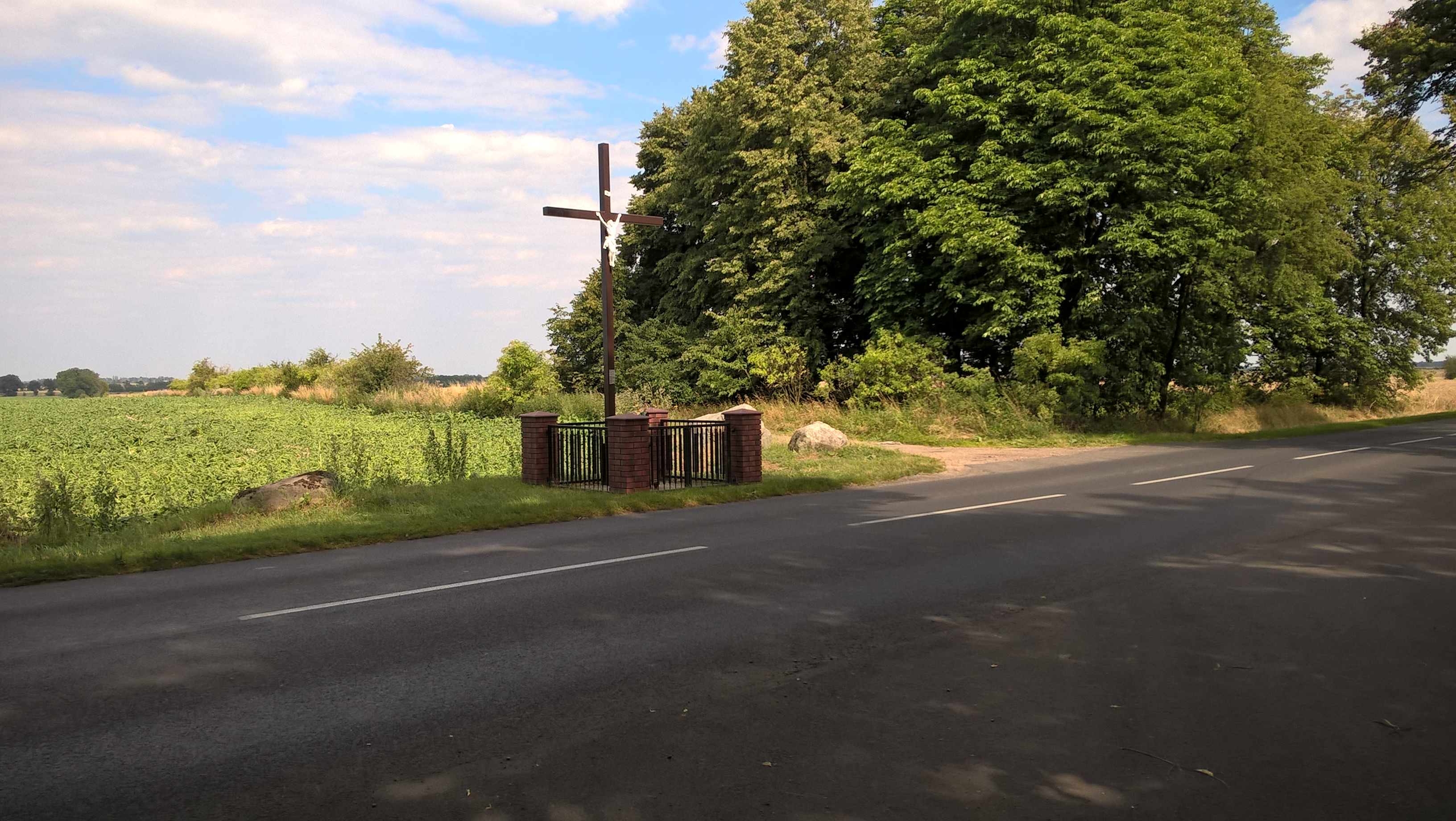 Dobrojewo - rzeźba Chrystusa ok. 1750r. na drewnianym krzyżu z 1945r.